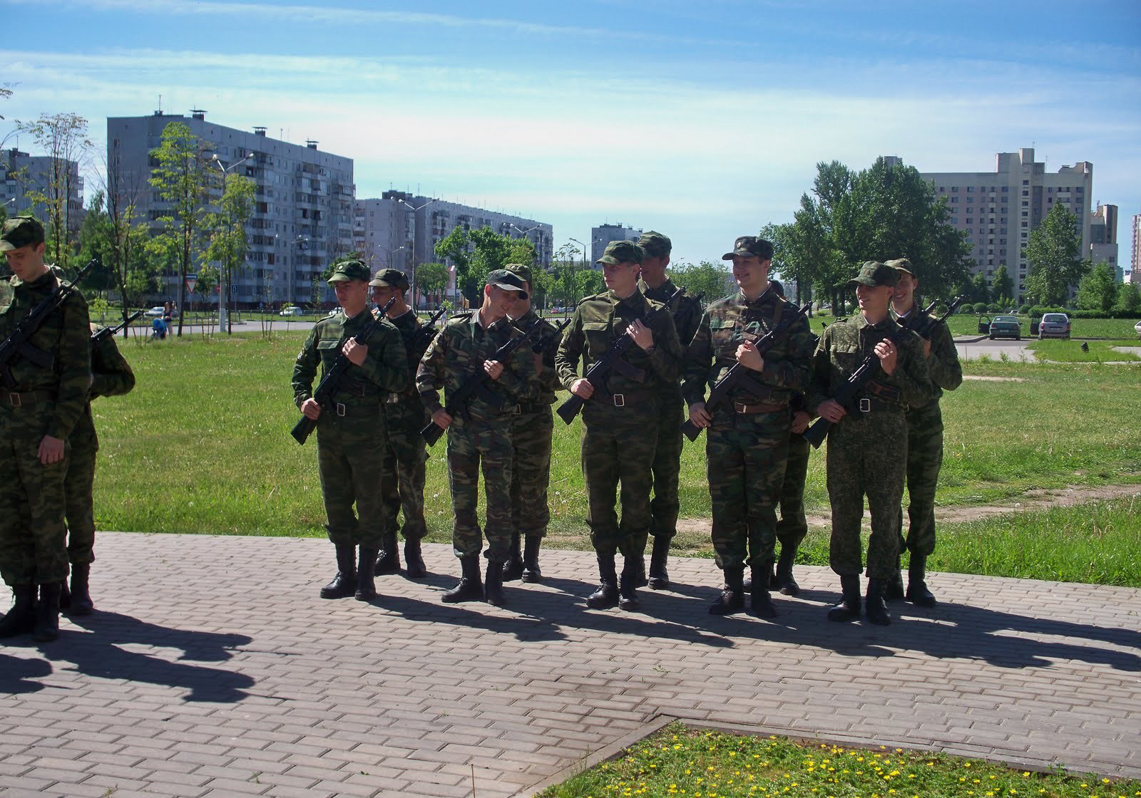 Military in Vitebsk Belarus